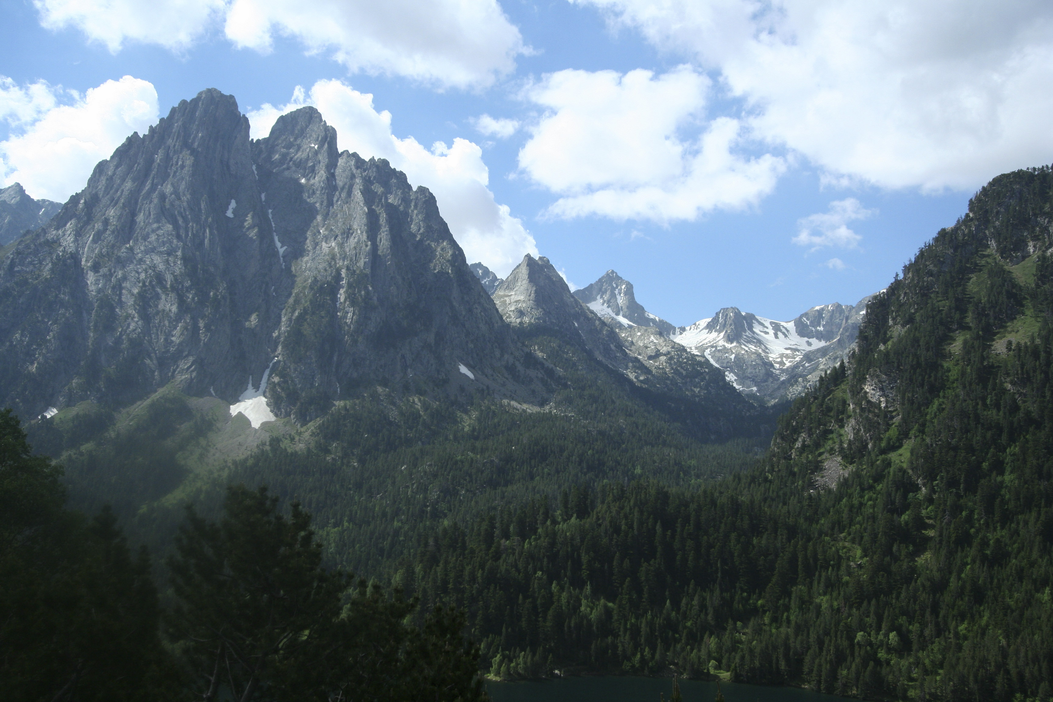 Pirineu:Vall de Monestero, amb els Encantats a l'esquerra i el pic de Peguera al fons al centre.